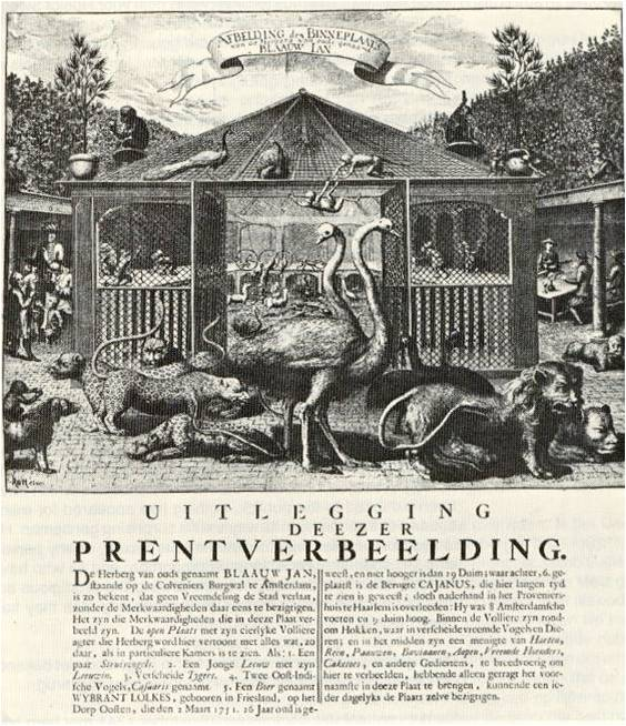 Innenhof des Blauw Jan in Amsterdam